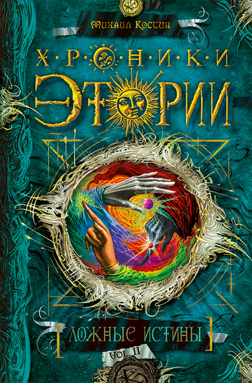 Обложка книги М. Костина «Хроники Этории. Ложные истины» 2014 года